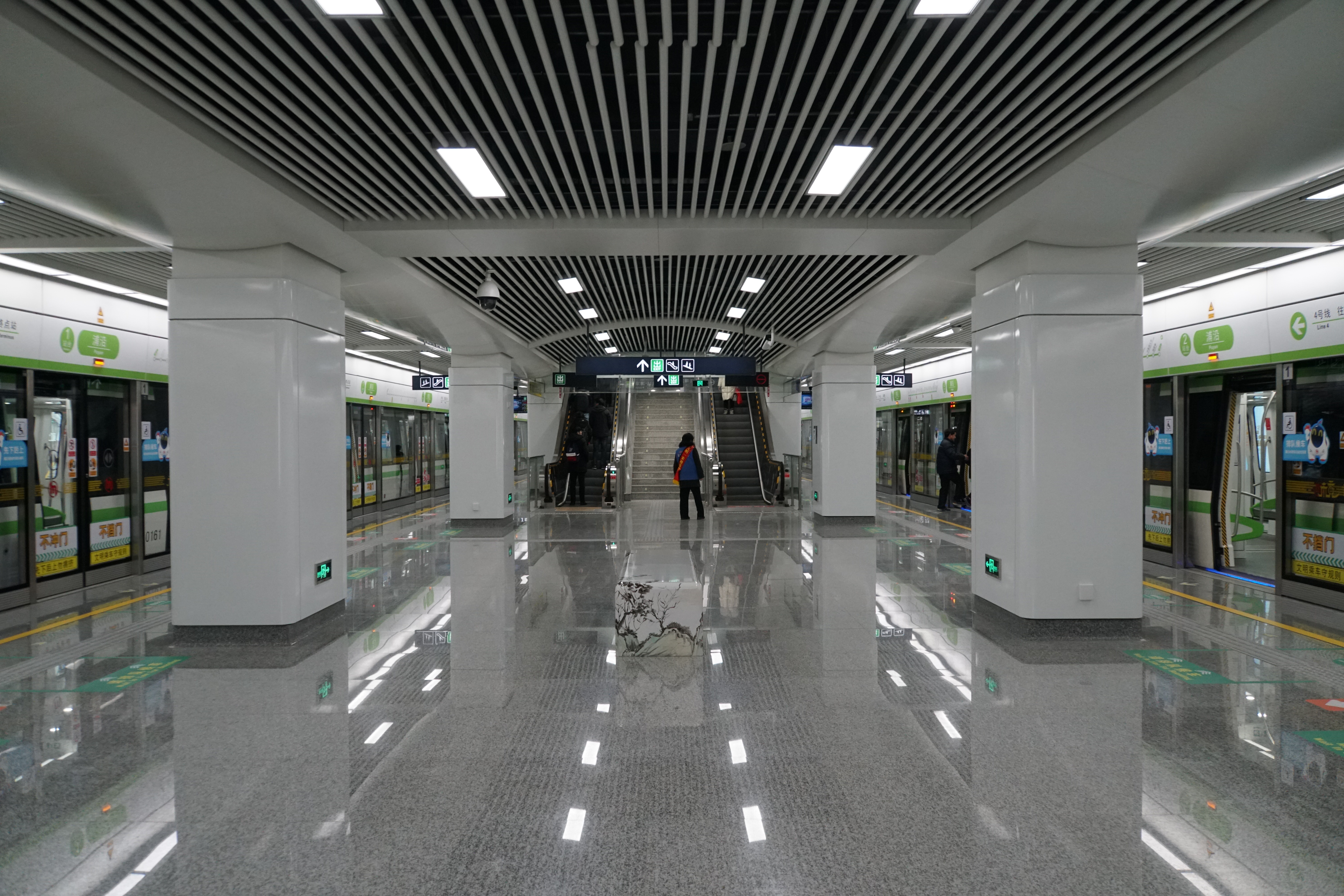 浦沿站站台